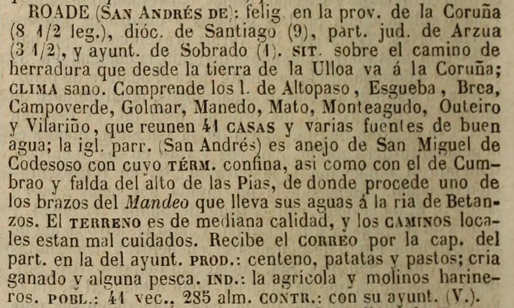 Roade no Diccionario geográfico-estadístico-histórico de España y sus posesiones de Ultramar.